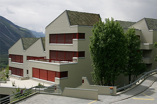 Oberstufen-Schulhaus in Leuk-Stadt